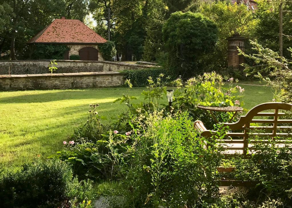 Blick auf die Remise 2019